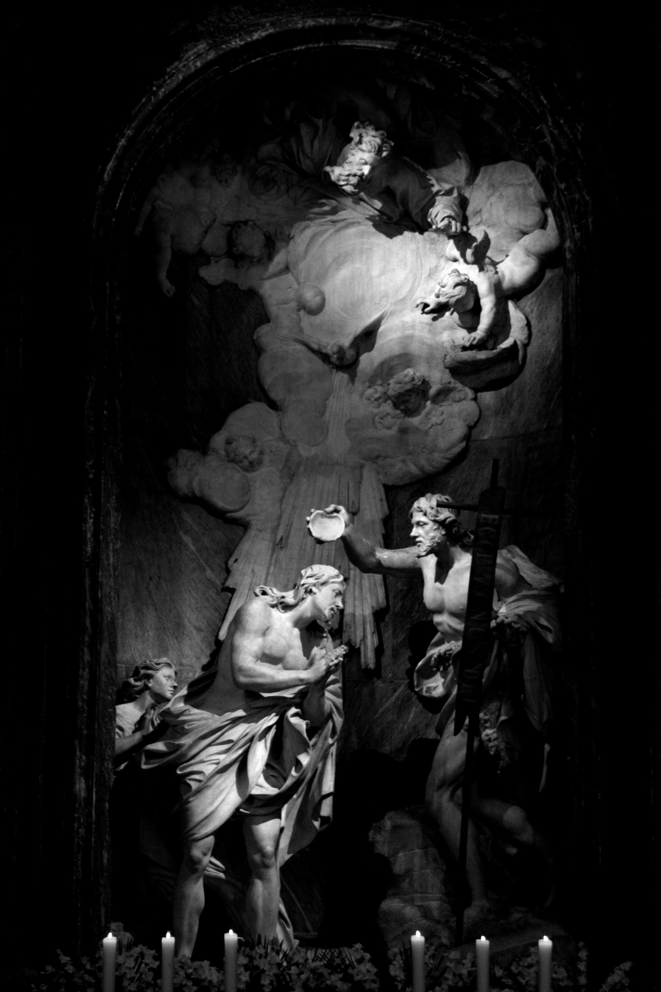 Autore: Denise Rana San Giovanni de' Fiorentini, Abside Proprietà: Simone Ferrari